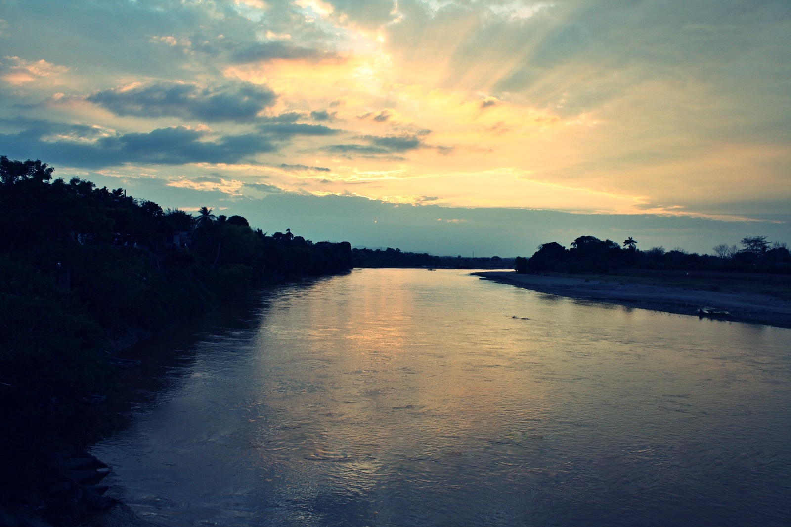 Atardecer en Playa Vicente